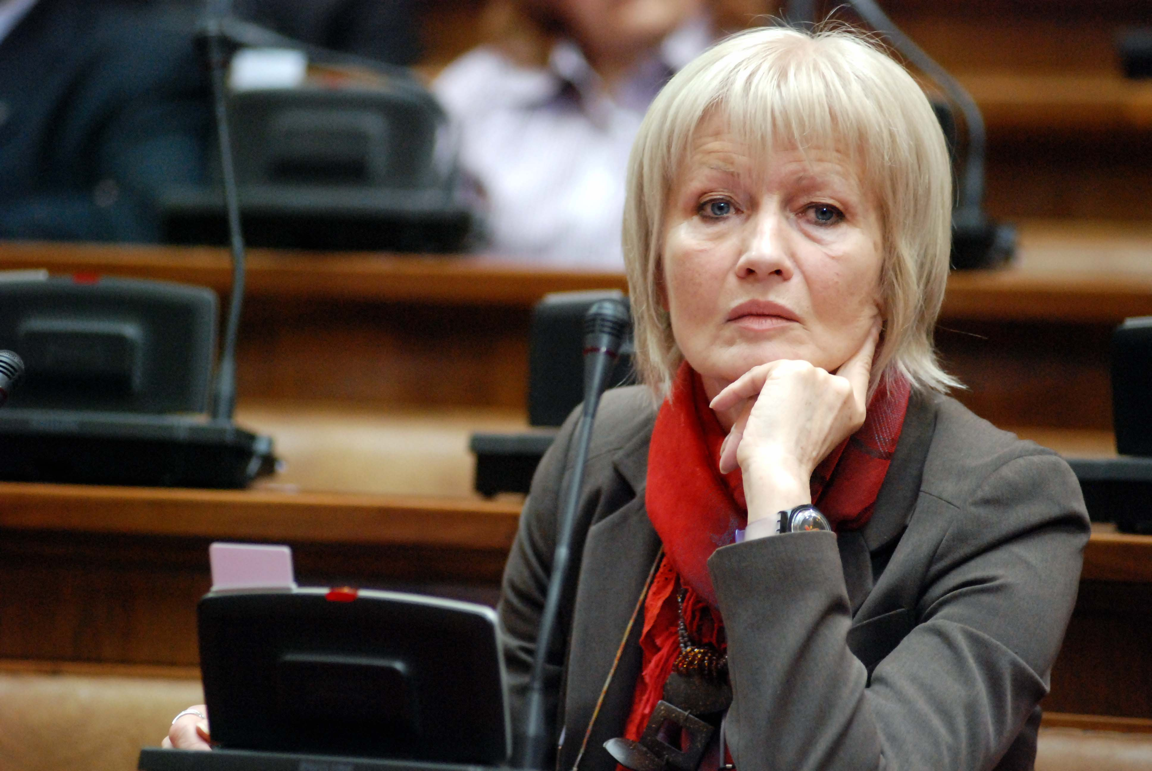 Nada Kolundžija na sednici Skupštine Srbije (28. april 2009); autor: Nenad Stojanović, Foto servis DS (posetite )